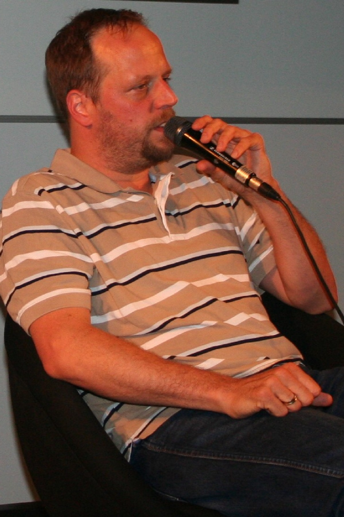 Smudo in der Mannheimer Popakademie zu Gast in der Diskussions-Reihe "Open.House"